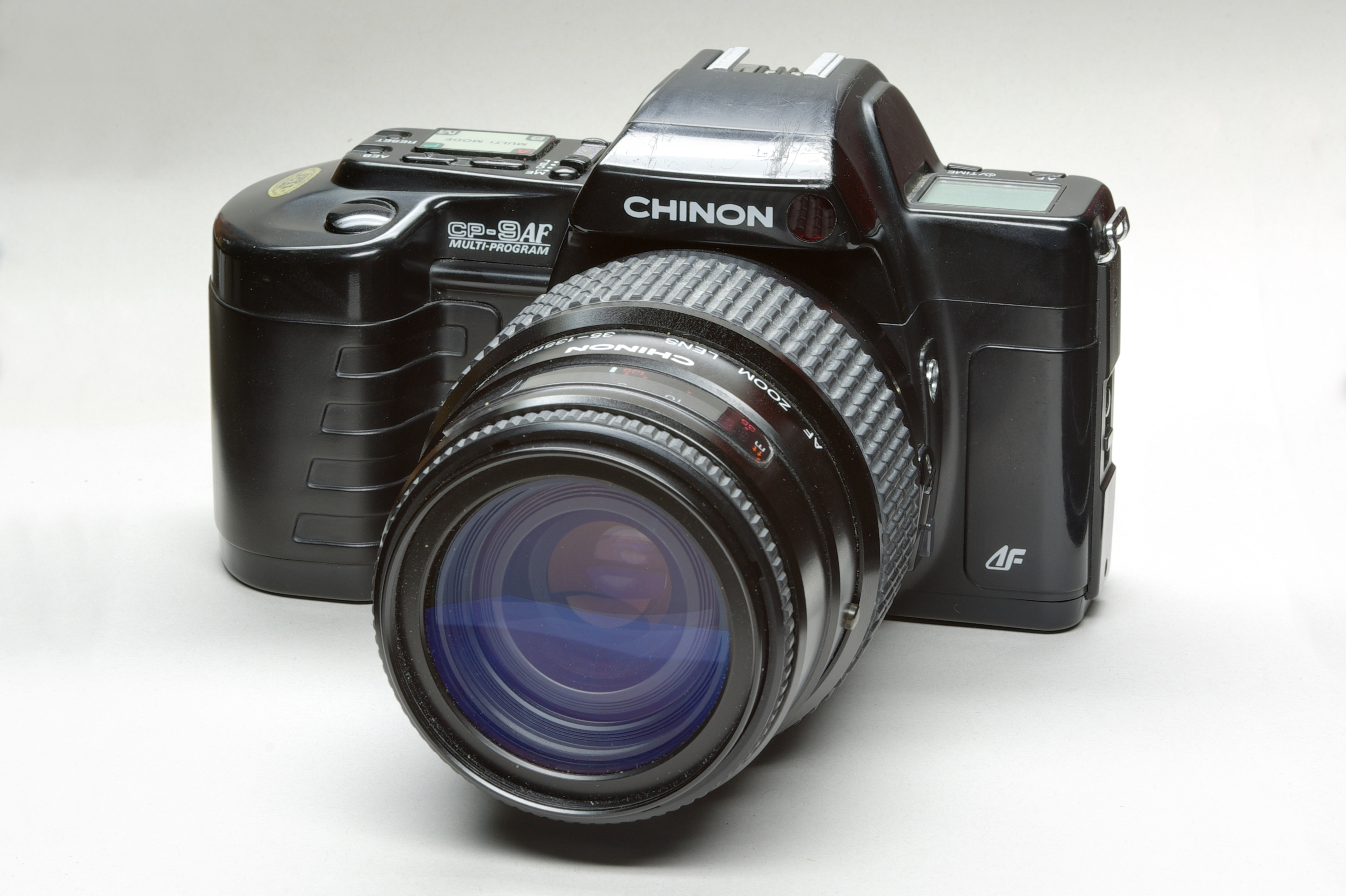 Chinon CP-9 AF mit seltenem 35-135mm Autofocusobjektiv